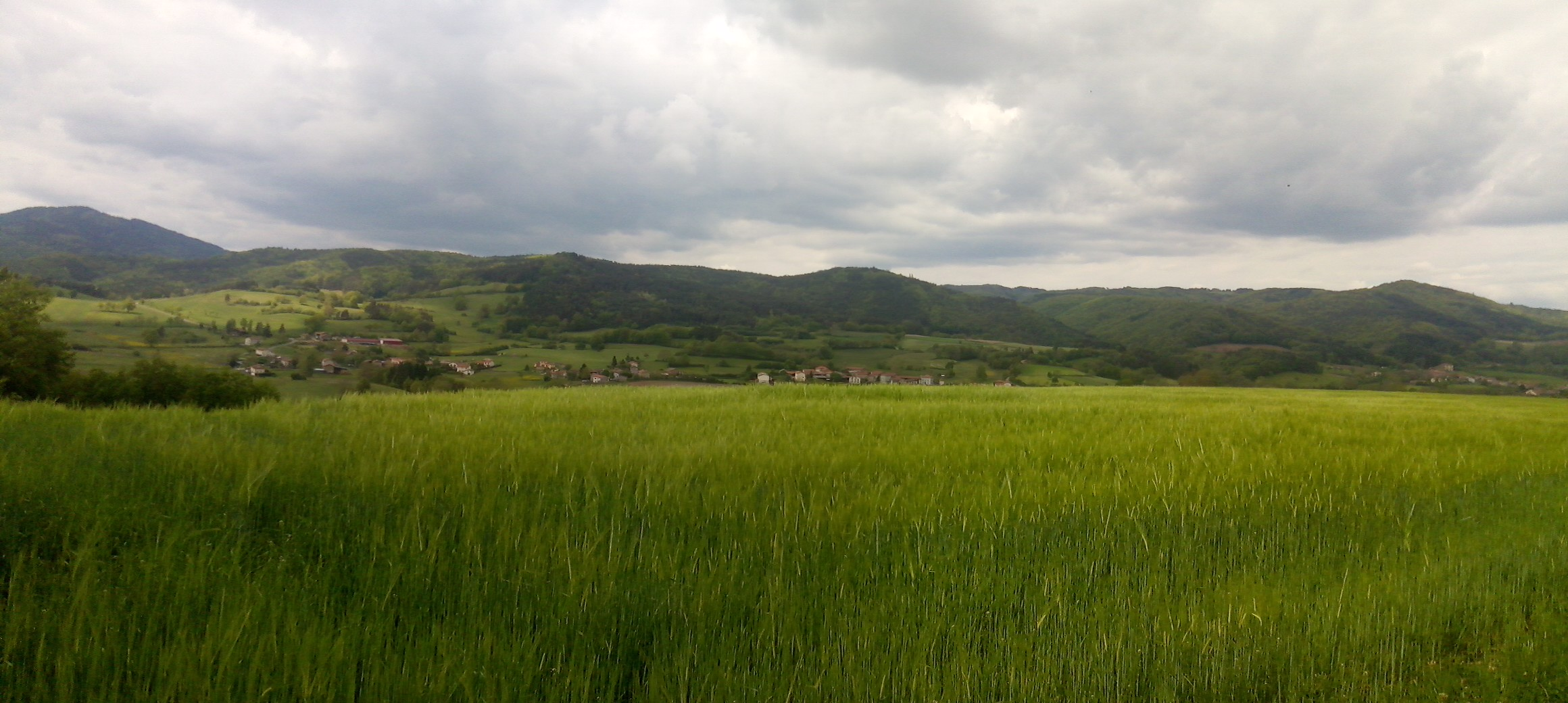 Hauteurs de Vorey (Les Terrases - Le Poux) vu de Sanimaux